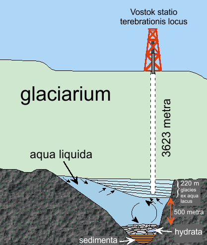 Schema terebrationis Vostok lacus